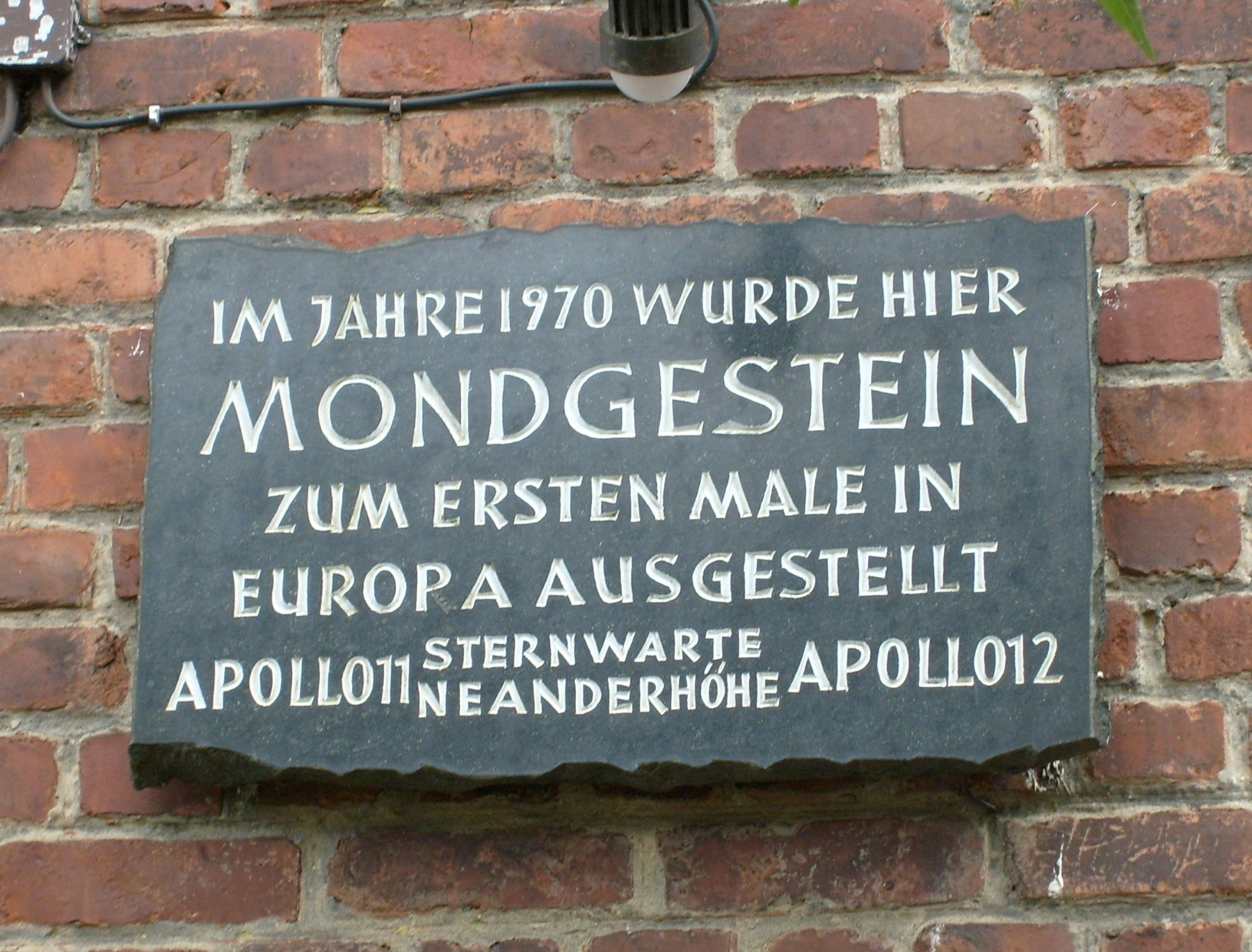 Erinnerungstafel am Gebäude Hildener Straße 10 anlässlich der ersten Ausstellung von Mondgestein in Europa in der Sternwarte Neanderhöhe